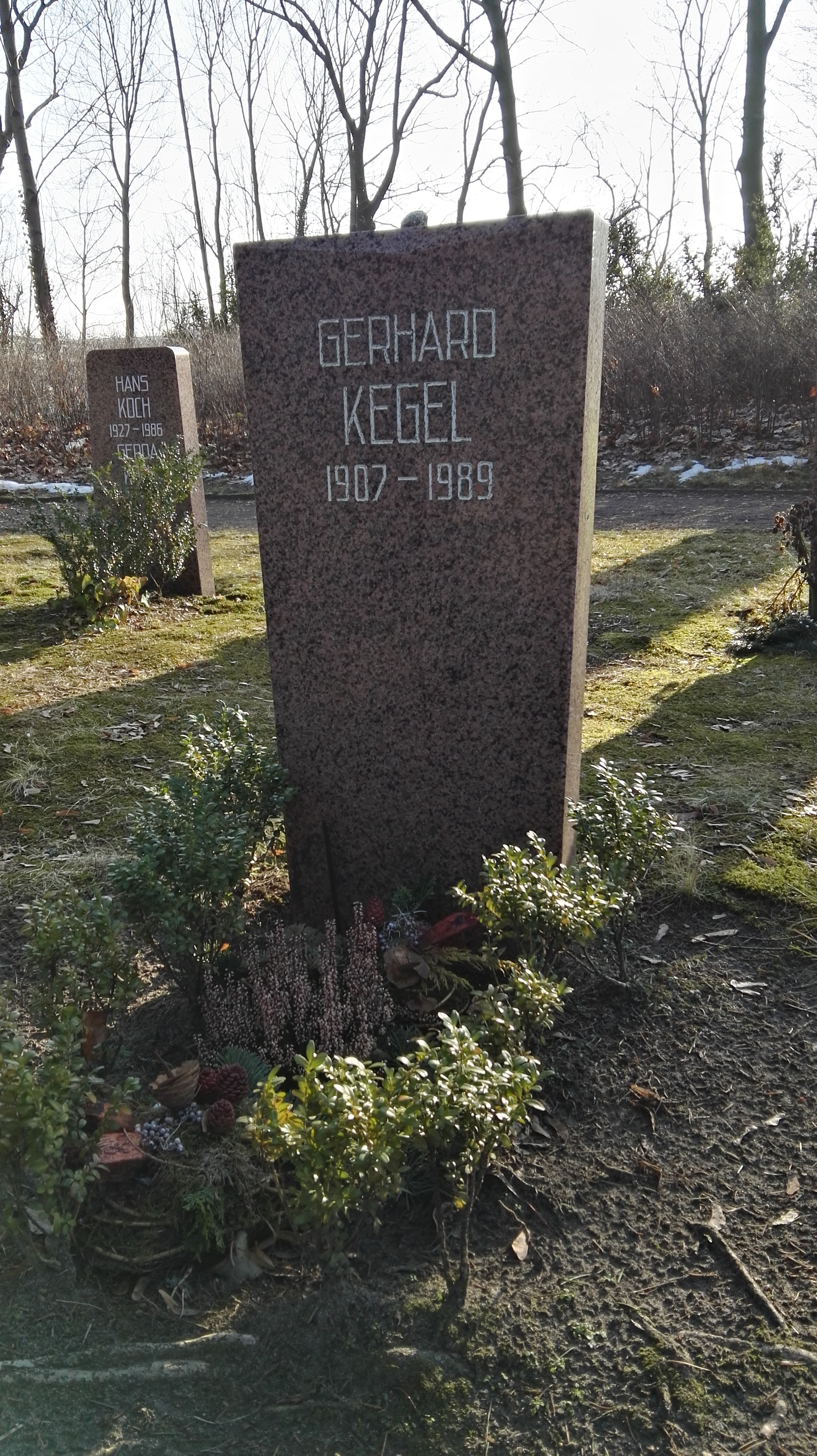 Grab von Gerhard Kegel in der Grabanlage Pergolenweg auf dem Sozialistenfriedhof des Zentralfriedhofs Friedrichsfelde